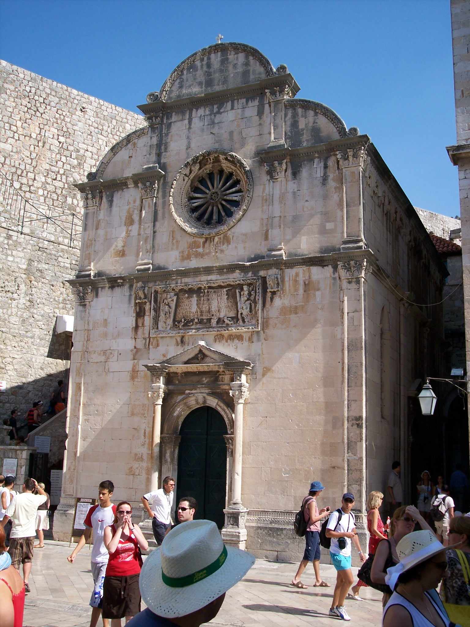 Dubrovnik (Croatia)